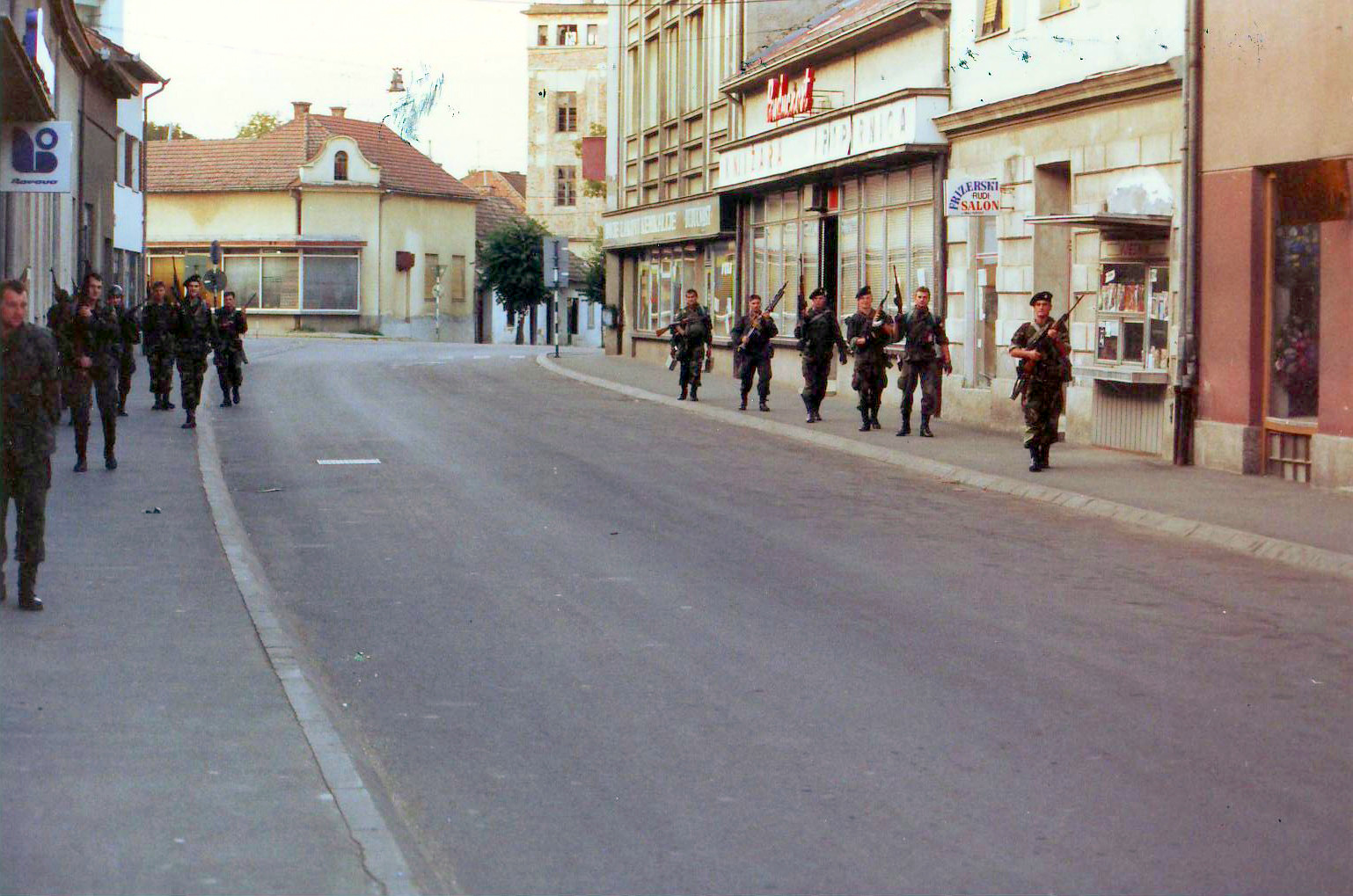 Pripadnici SJP Omege iz Bjelovara u Pakracu 19. kolovoza 1991.